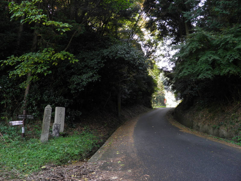 壺坂峠（奈良県高市郡高取町）